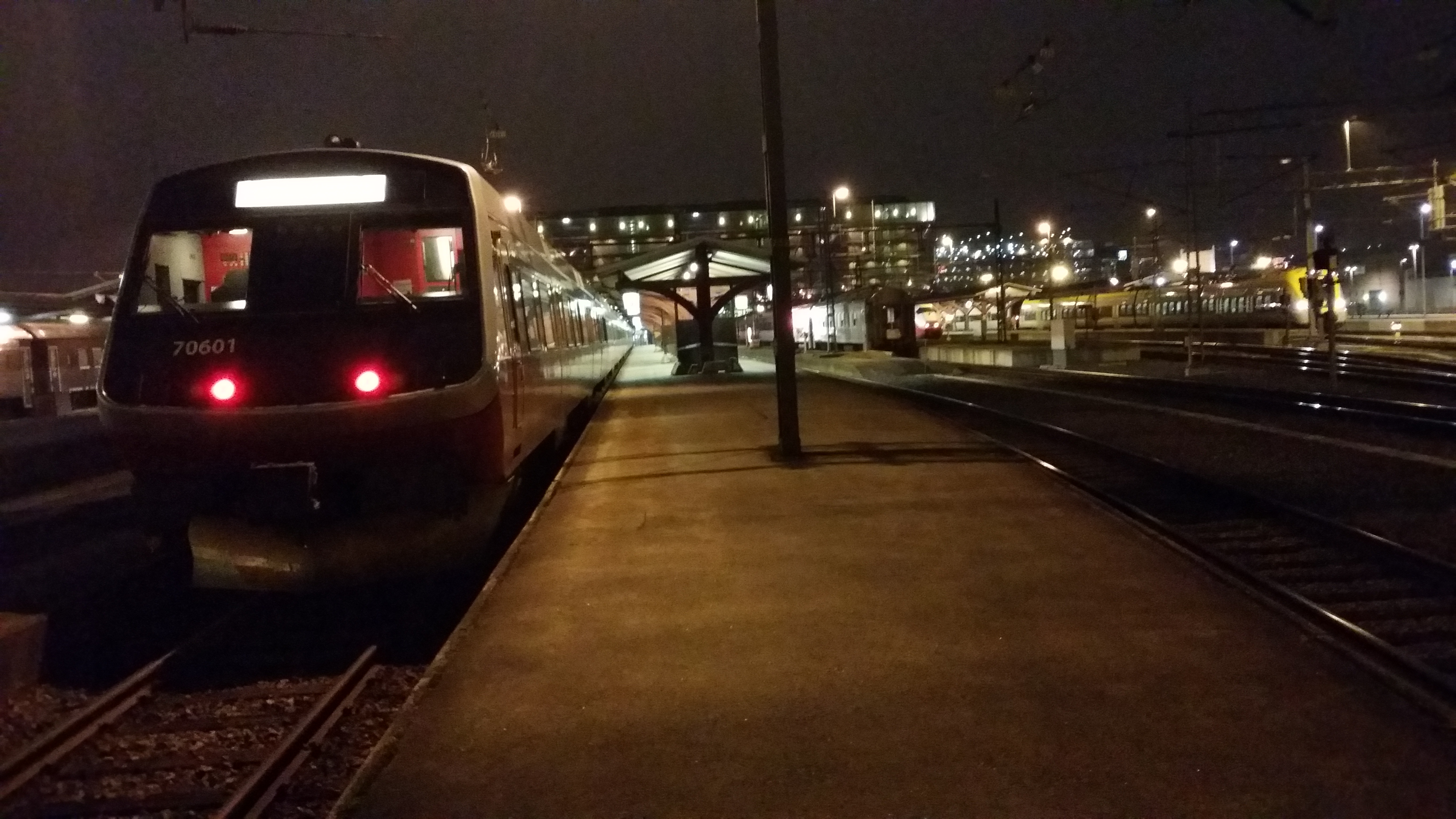 Kveld på Göteborg C. Parkert togsett ankommet fra Oslo.